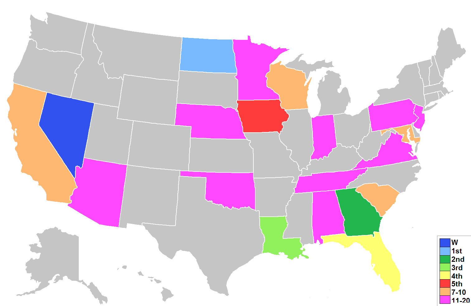 Miss USA 2014 Positions